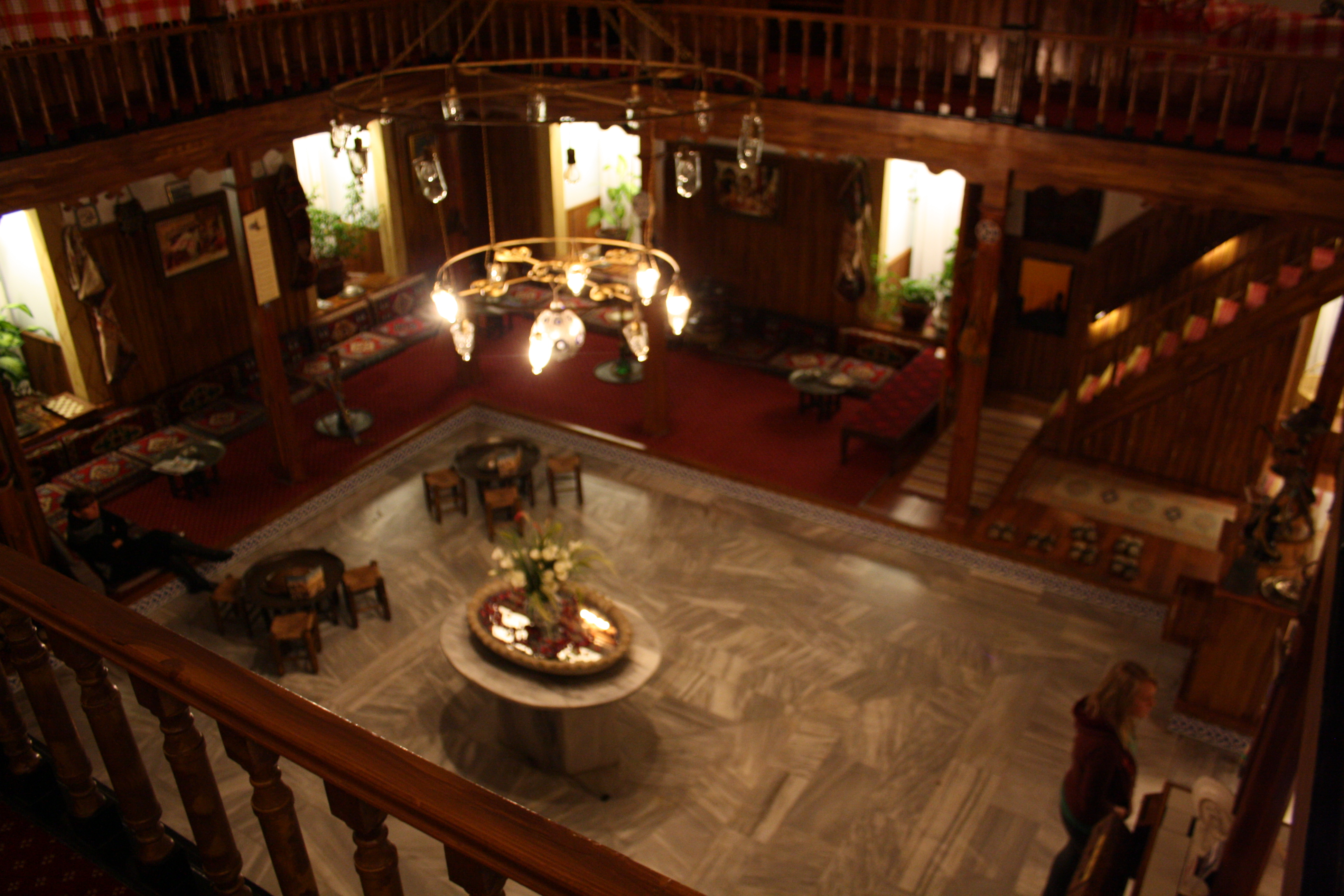 Hamam Suleymaniye